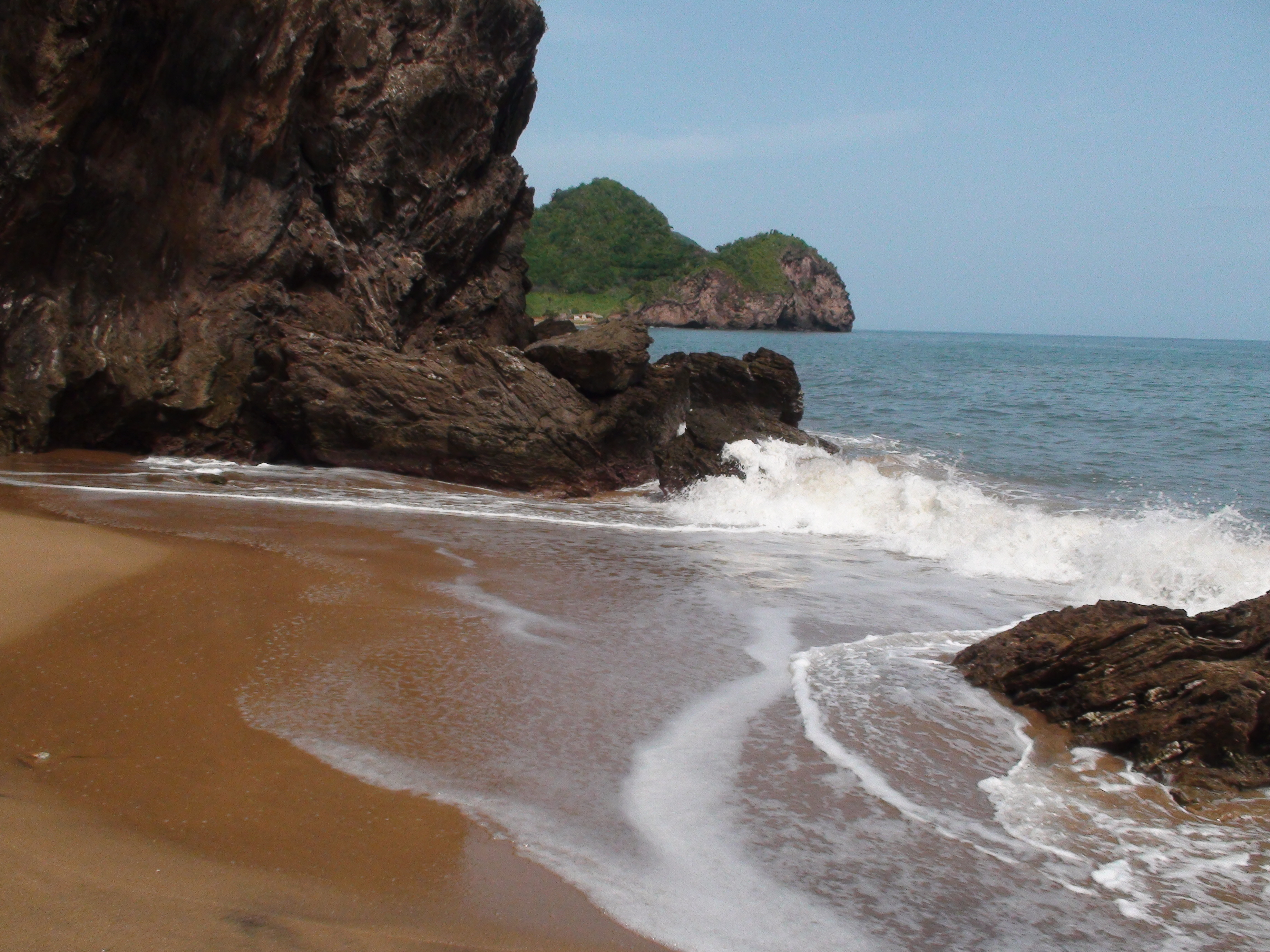 Nivaldito